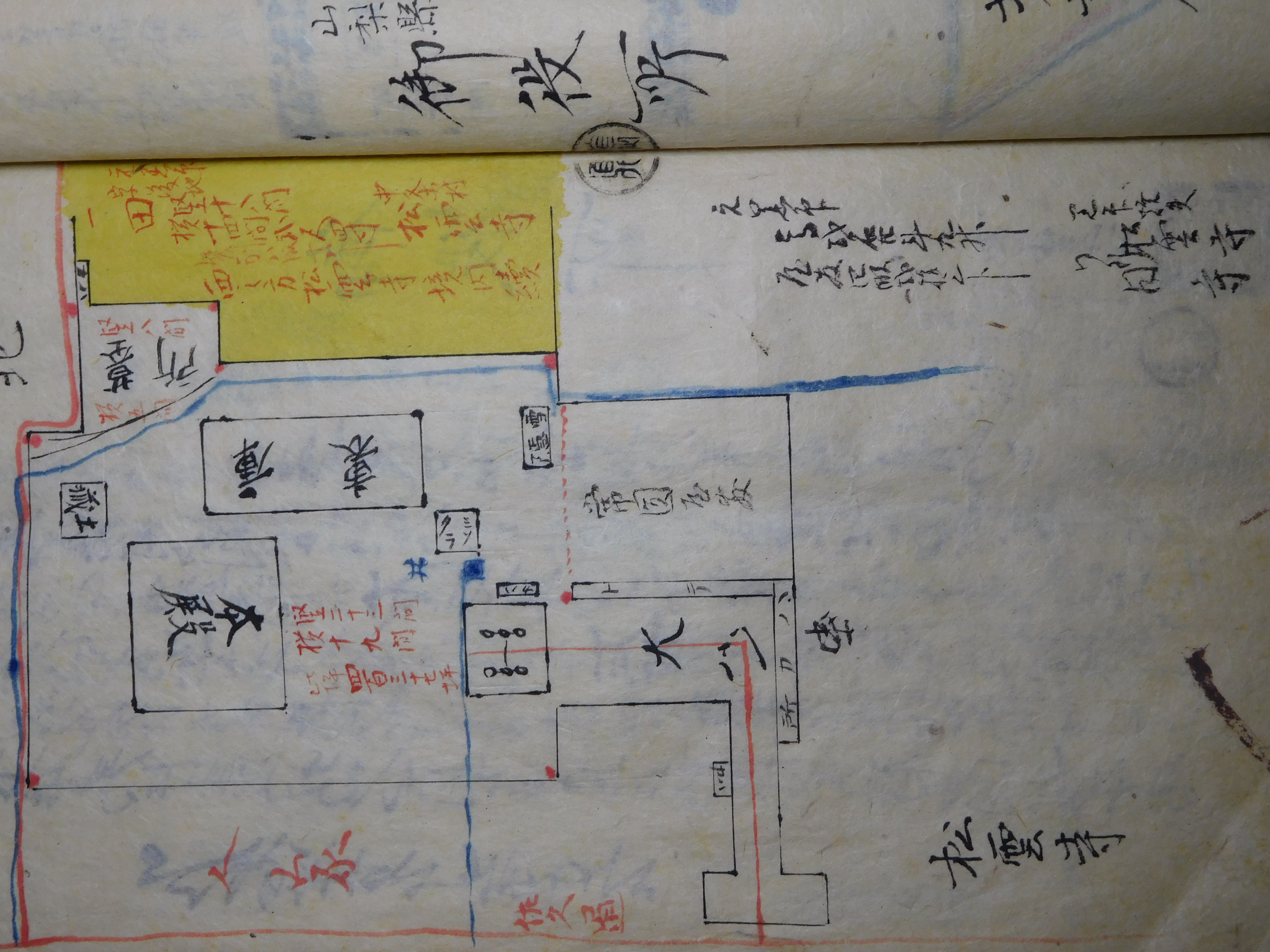 明治五年の松雲寺地図